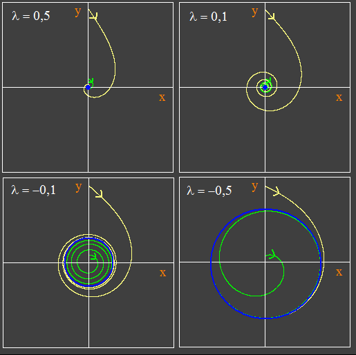 Verloop van een Hopf bifurcatie